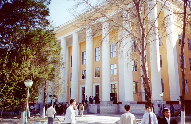 Ташкентский университет информационных технологий